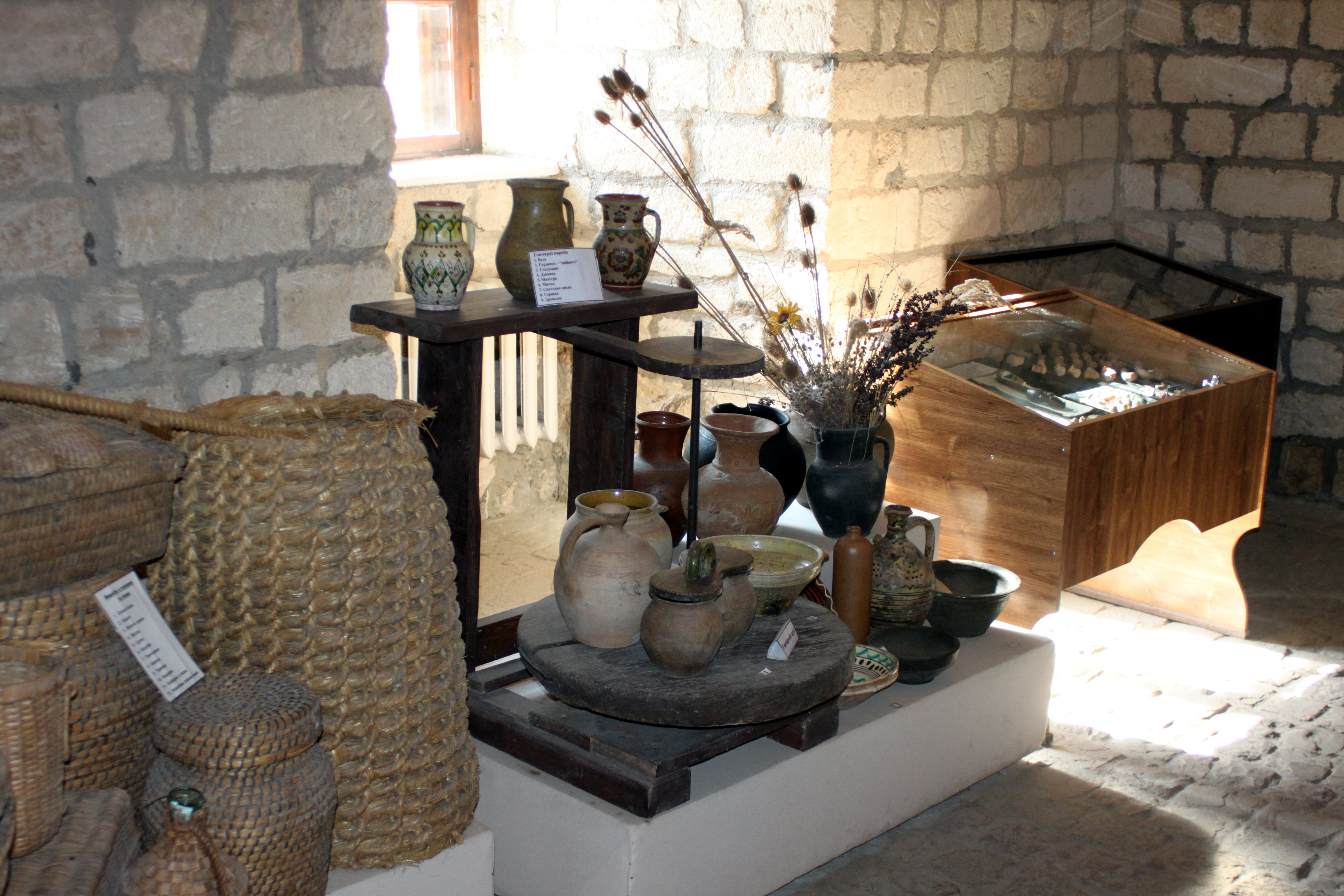 Замок, вул. Морозенка, 38, Збараж